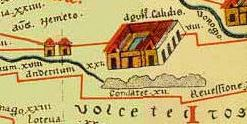 Vichy et Condate sur la table de Peutinger